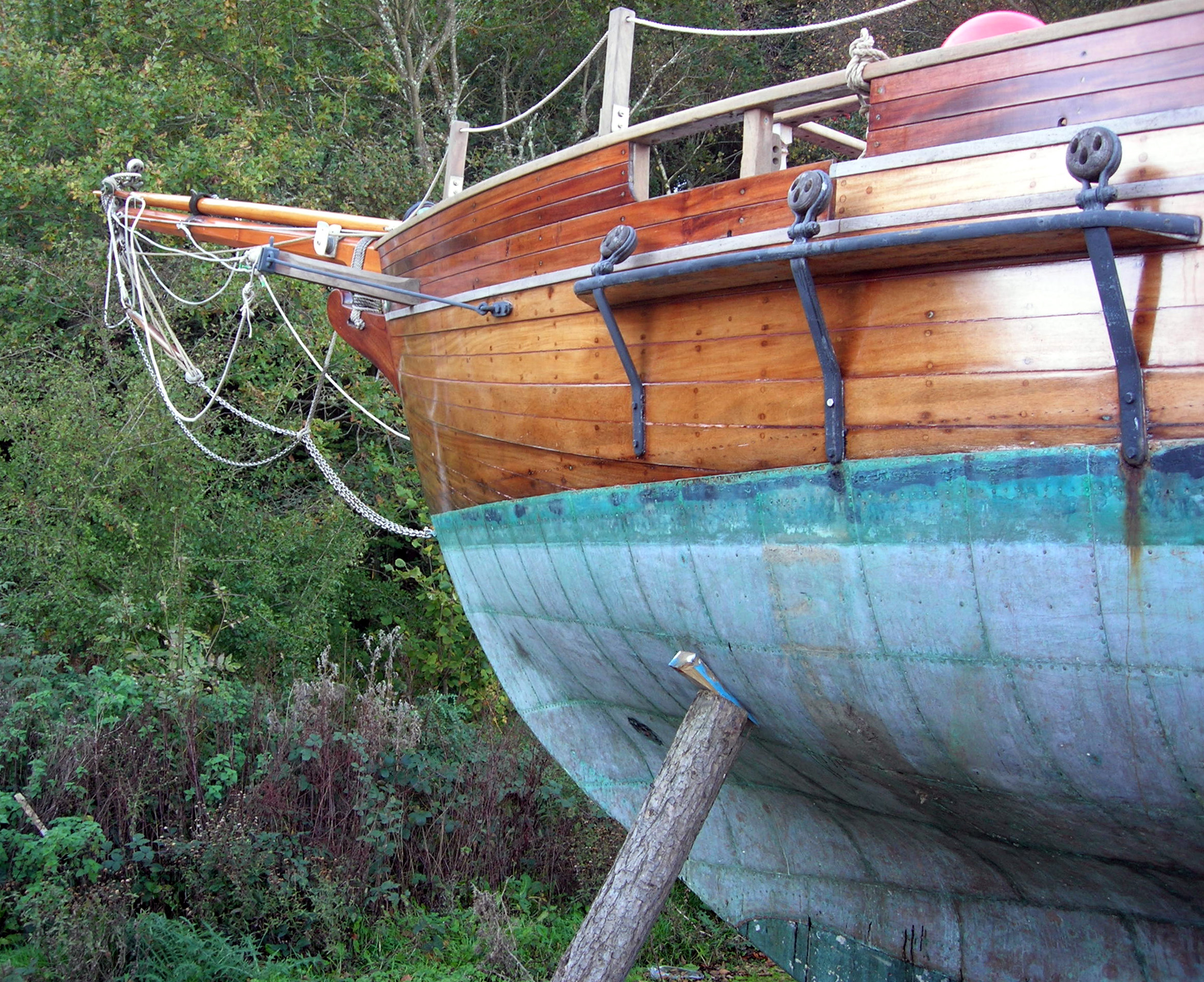 Coque en bois doublée de cuivre à Bucklers Hard